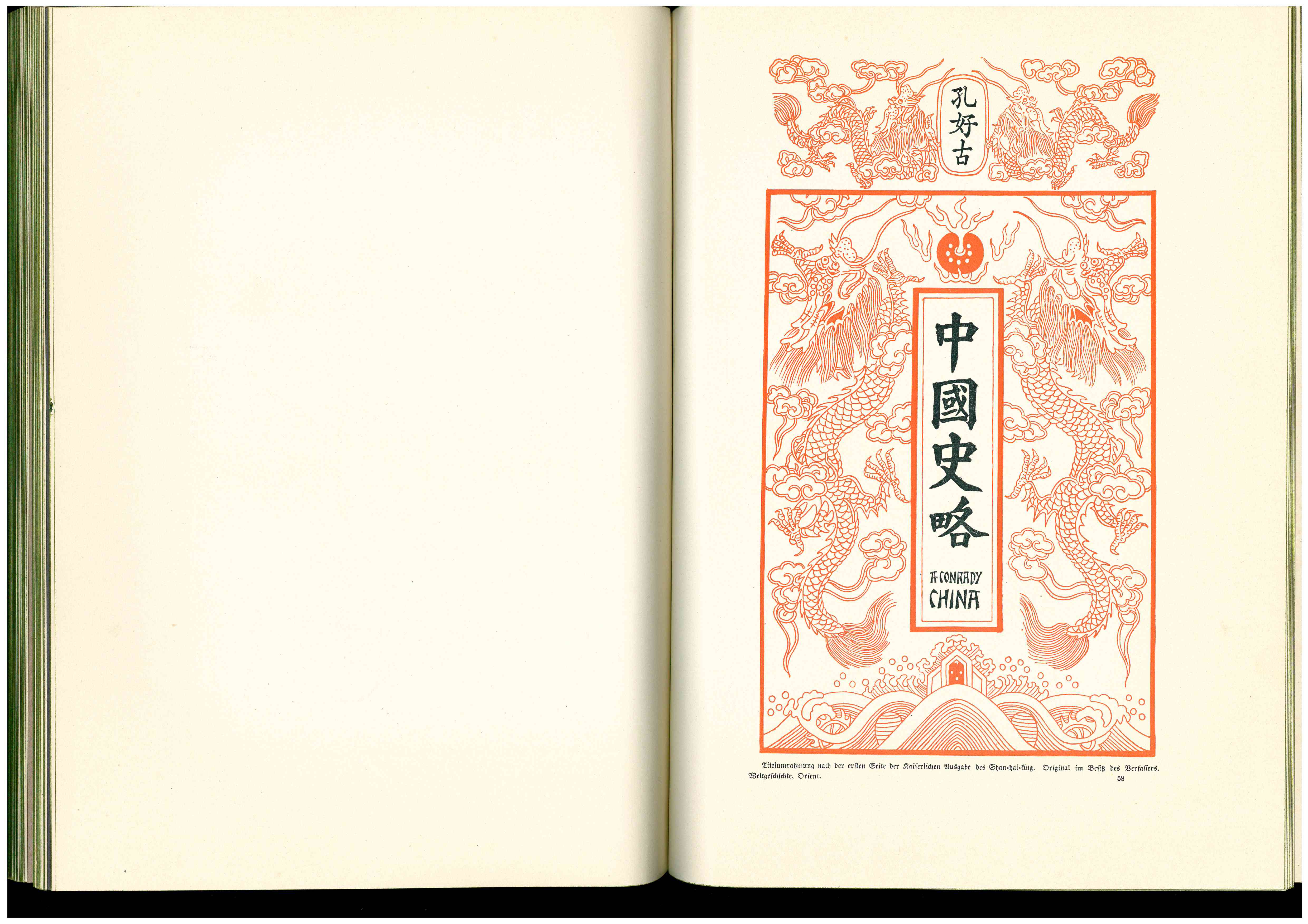 Titelrahmung nach der ersten Seite der kaiserlichen Ausgabe des Shanhaijing